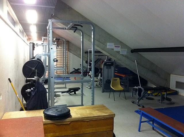 La salle de musculation du stade Jean Delbert à Montreuil (Seine-Saint-Denis).